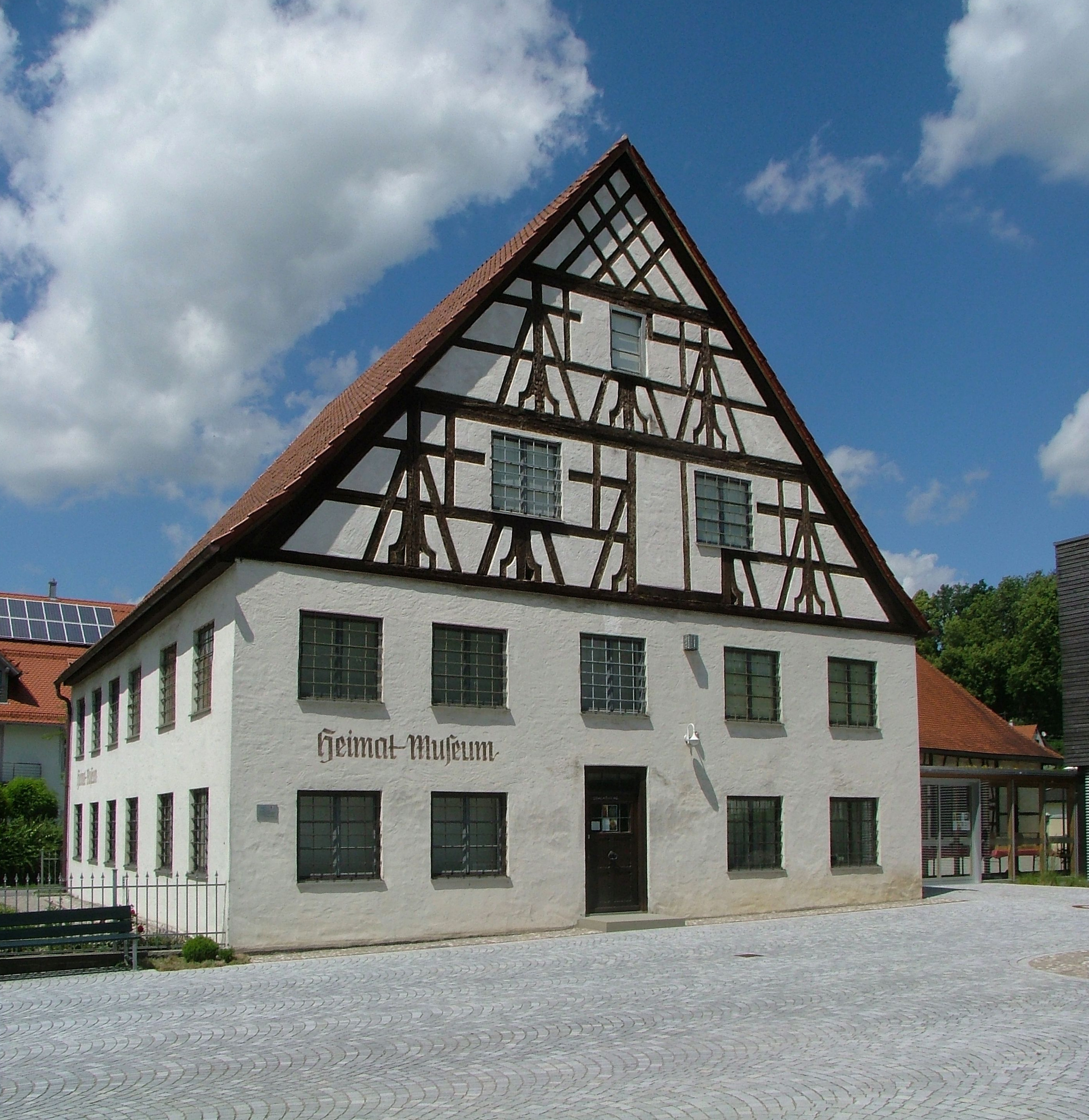 Heimatmuseum